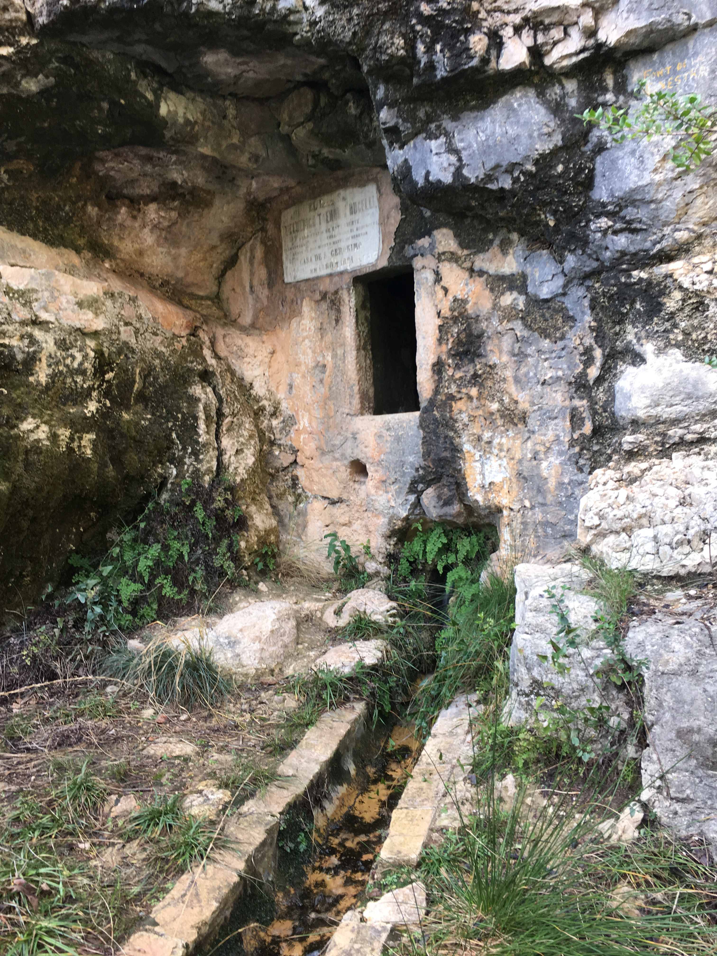 Font de la Finestra. Barranc de la Falzia. Borró. Almirserà. La Safor